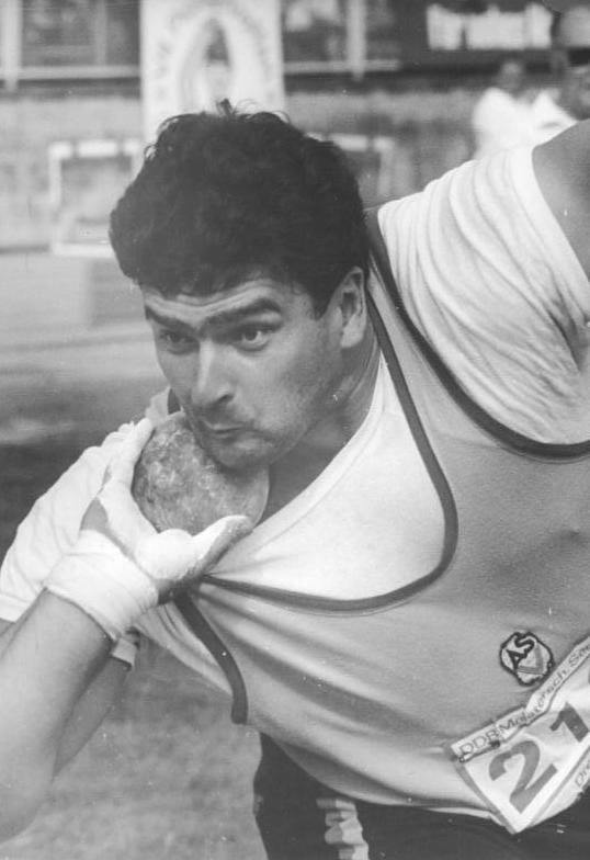 Udo Beyer ADN-ZB Häßler 2.7.82 Dresden: Leichtathletik Der ASK-Sportler aus Potsdam Udo Beyer holte sich bei den DDR-Leichtathletik-Meisterschaften der DDR in Dresden im Kugelstoßen mit 21,47 m den DDR-Meistertitel. Abgebildete Personen: Beyer, Udo: Kugelstoßer, DDR